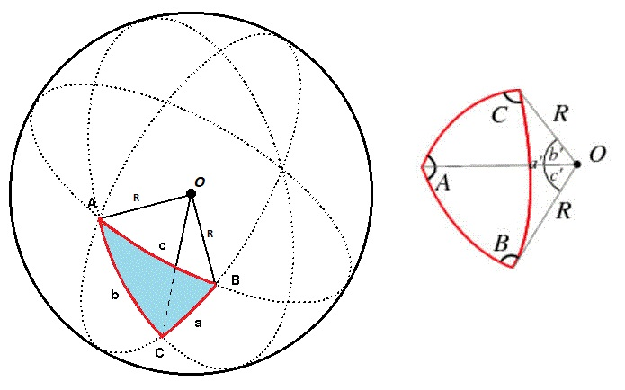 Küresel üçgenin üç boyutlu çizimde (küre üzerinde) gösterimi